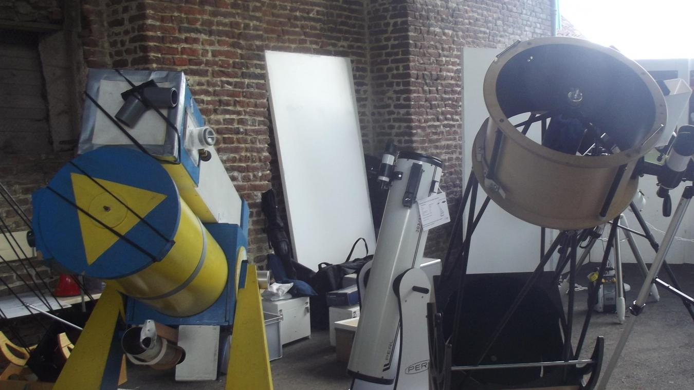 les dispositifs pour la nuit des étoiles